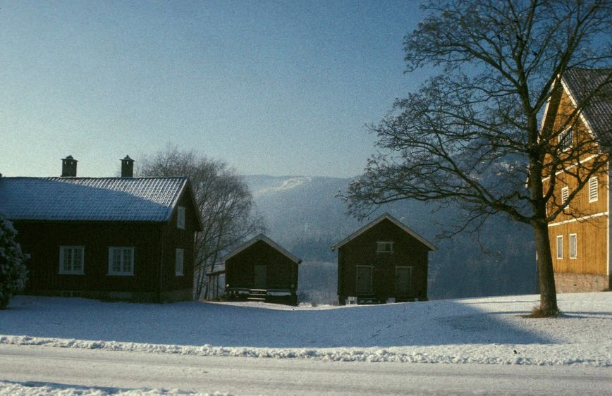 To stabbur (ett for presten, ett for forpakteren) ved Sauherad prestegård